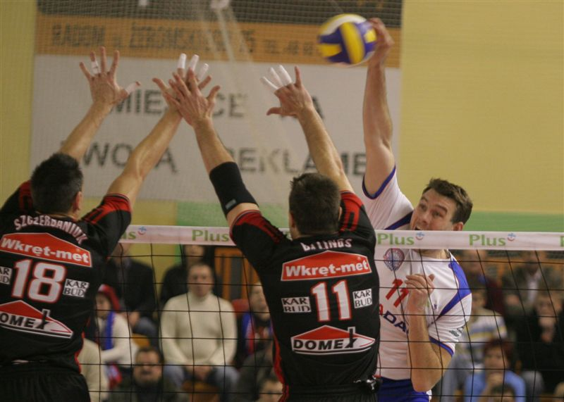 Jadar Radom - 2007/2008